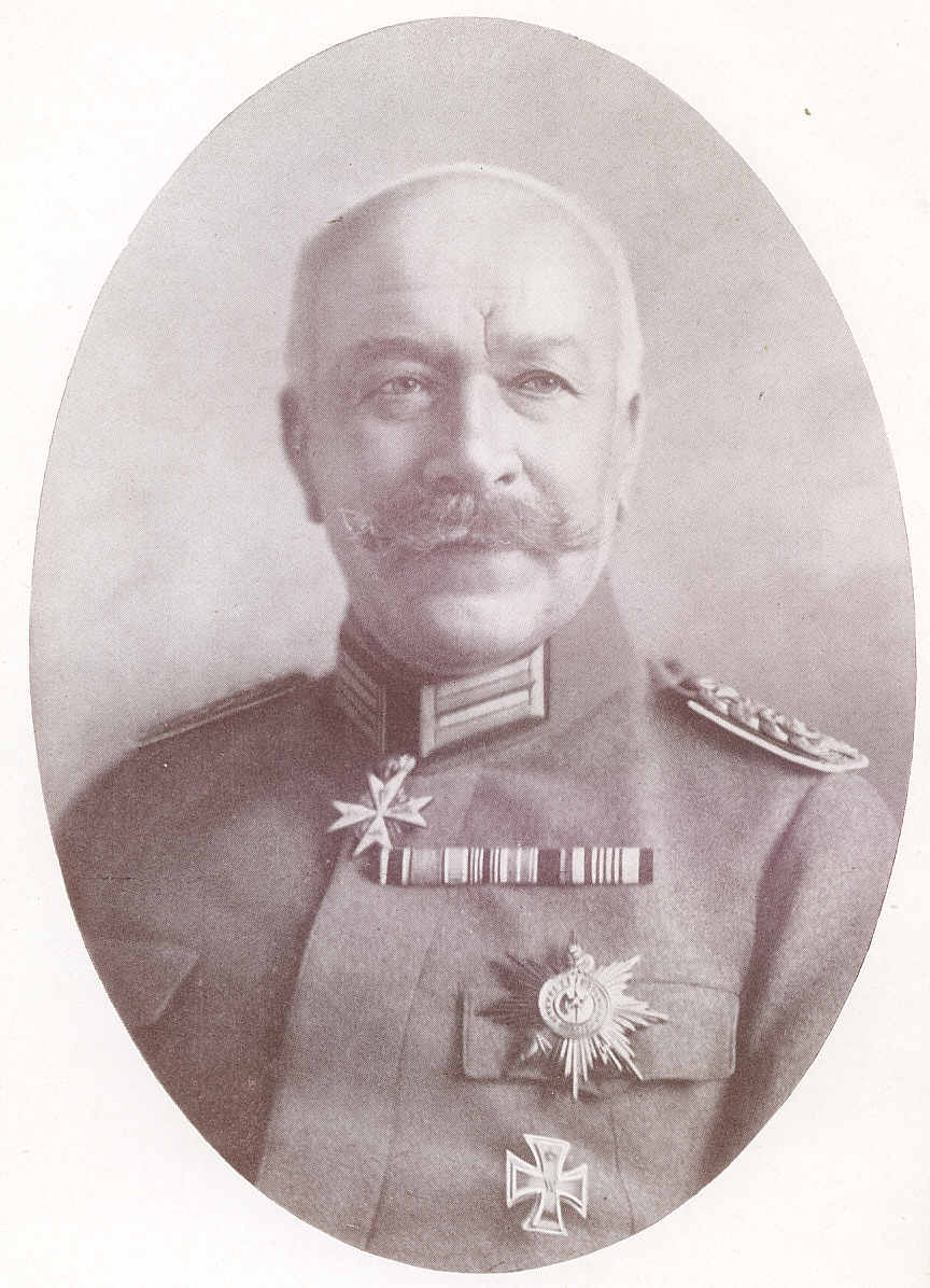 Hermann von Francois, German General, 1856-1933